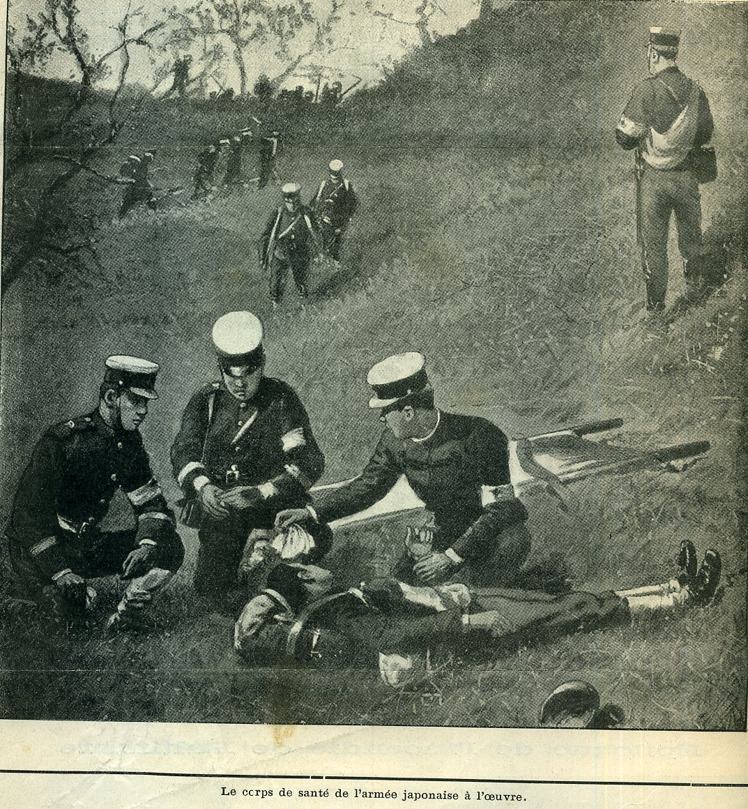 see picture